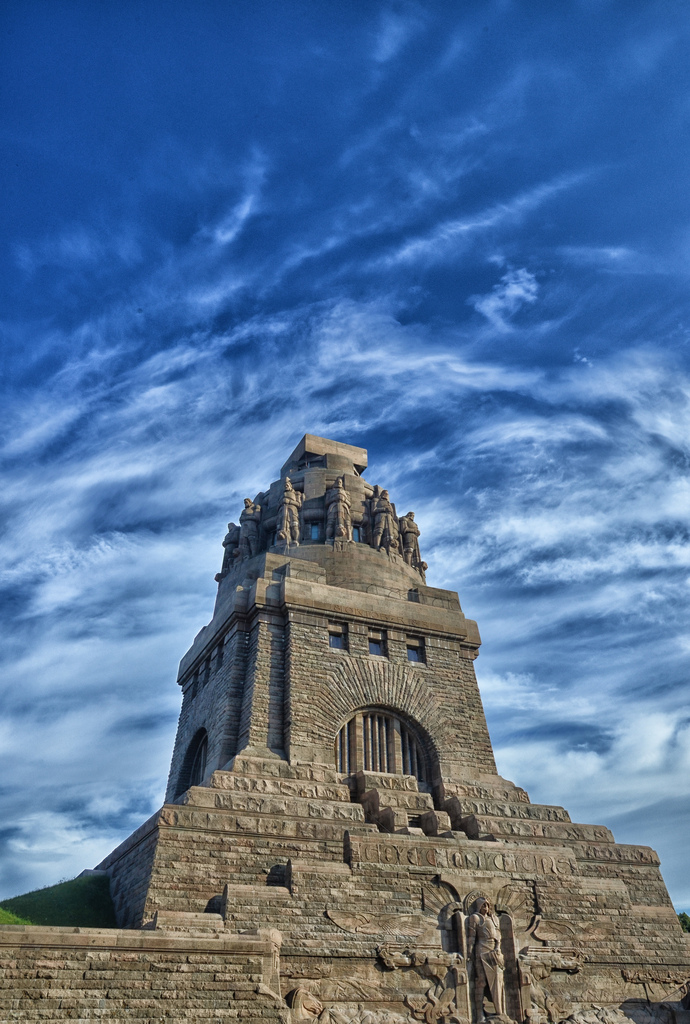 Völkerschlachtdenkmal aus der Nähe, von links unten